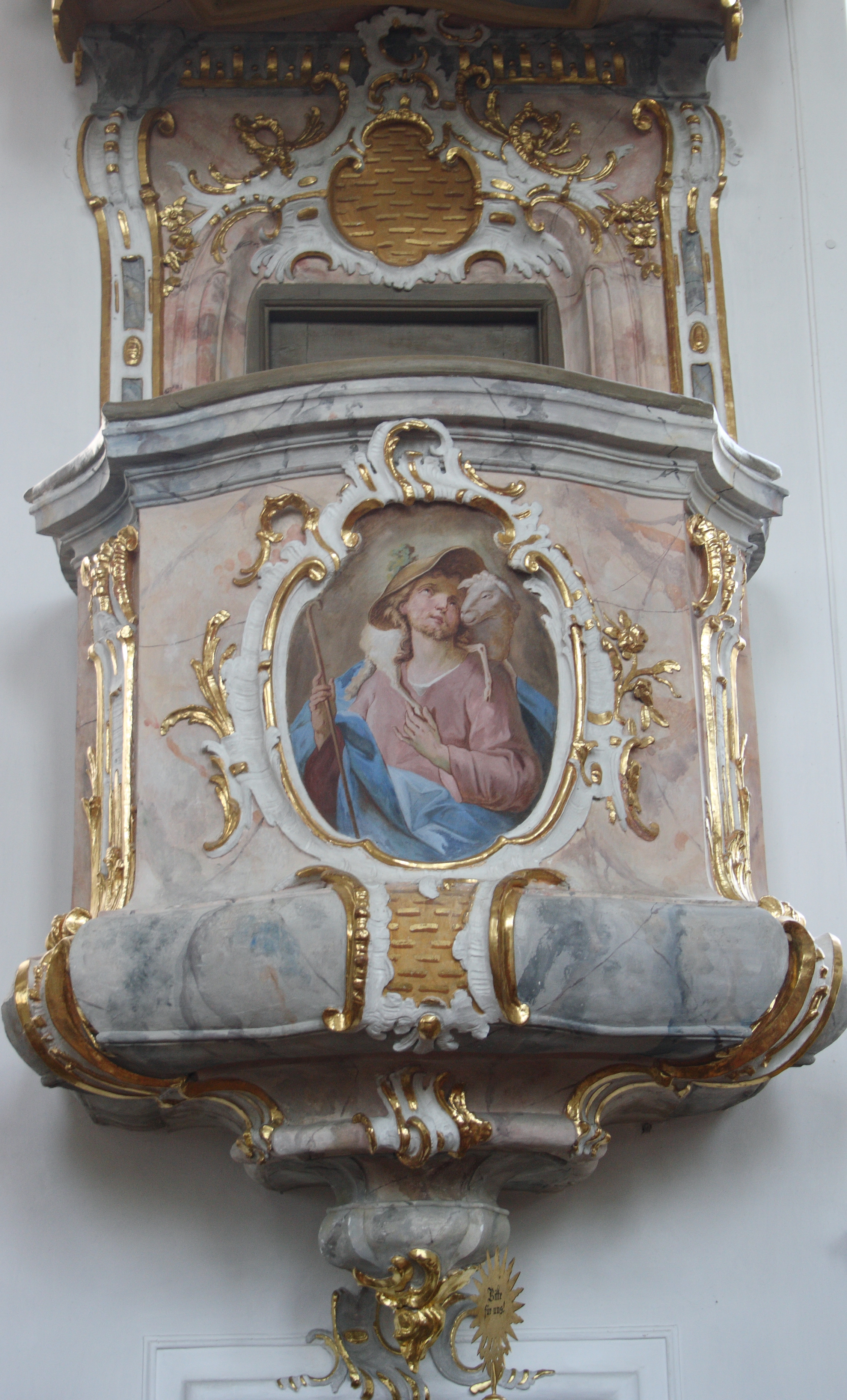 Katholische Pfarrkirche Mariä Himmelfahrt in Ettenbeuren, einem Ortsteil der Gemeinde Kammeltal im Landkreis Günzburg (Bayern), Stuckkanzel um 1766, Fresko wohl von Joseph Christ, Darstellung: Guter Hirte